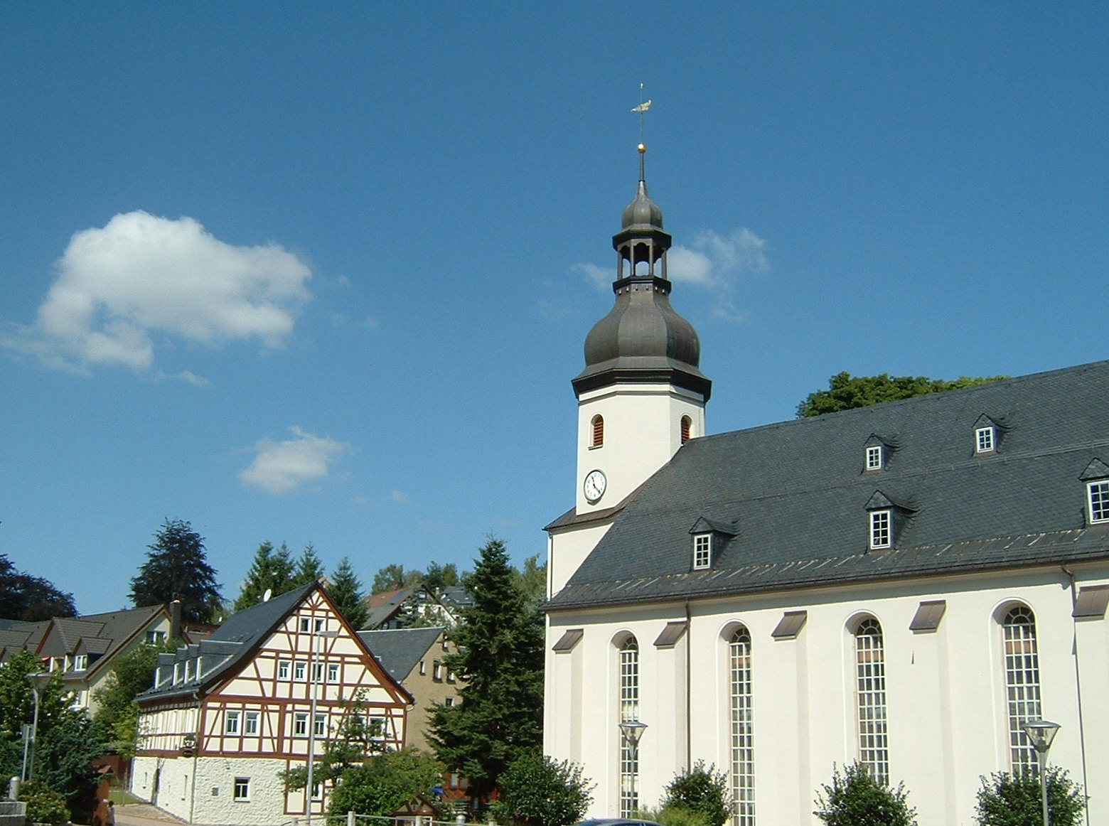 Schönheide im Erzgebirge in Sachsen, Germany - Kirche von 1773 und Bürsten- und Heimatmuseum (Fachwerkhaus links)